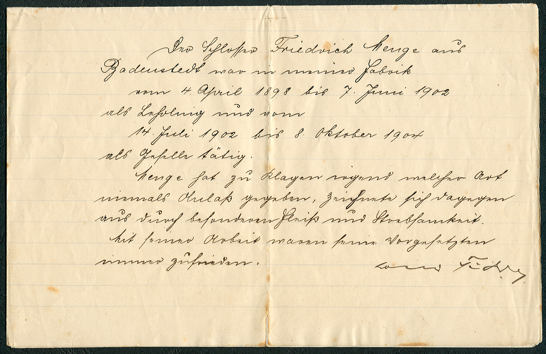 Zeugnis-Text: "Der Schlosser Friedrich Menge aus Badenstedt war in meiner Fabrik vom 4. April 1898 bis 7. Juni 1902 als Lehrling und vom 14. Juli 1902 bis 8. Oktober 1904 als Geselle tätig. Menge hat zu Klagen irgend welcher Art niemals Anlaß gegeben, ..." (handschriftliche Unterschrift Louis Tidow) ...